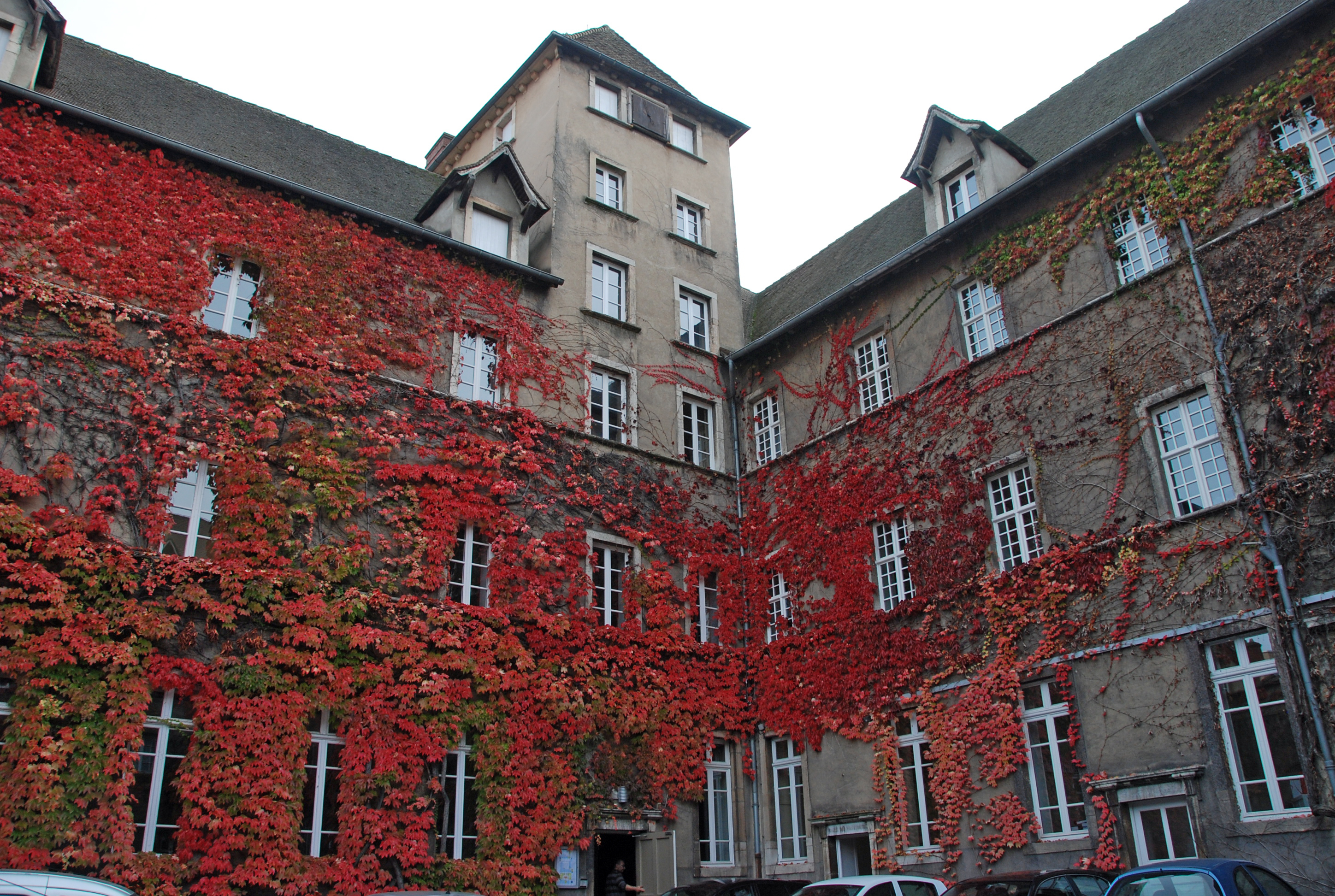 Grand Lycée Lycée Lamartine